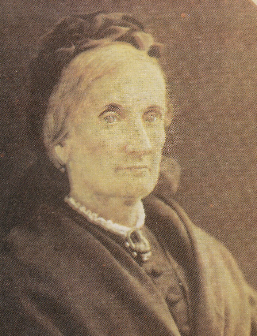 Acercamiento de fotografía del año 1870 en Santiago de Chile, que se encuentra en álbum familiar. Nació en Londres el año de 1804 y falleció en Santiago de Chile en 1873.